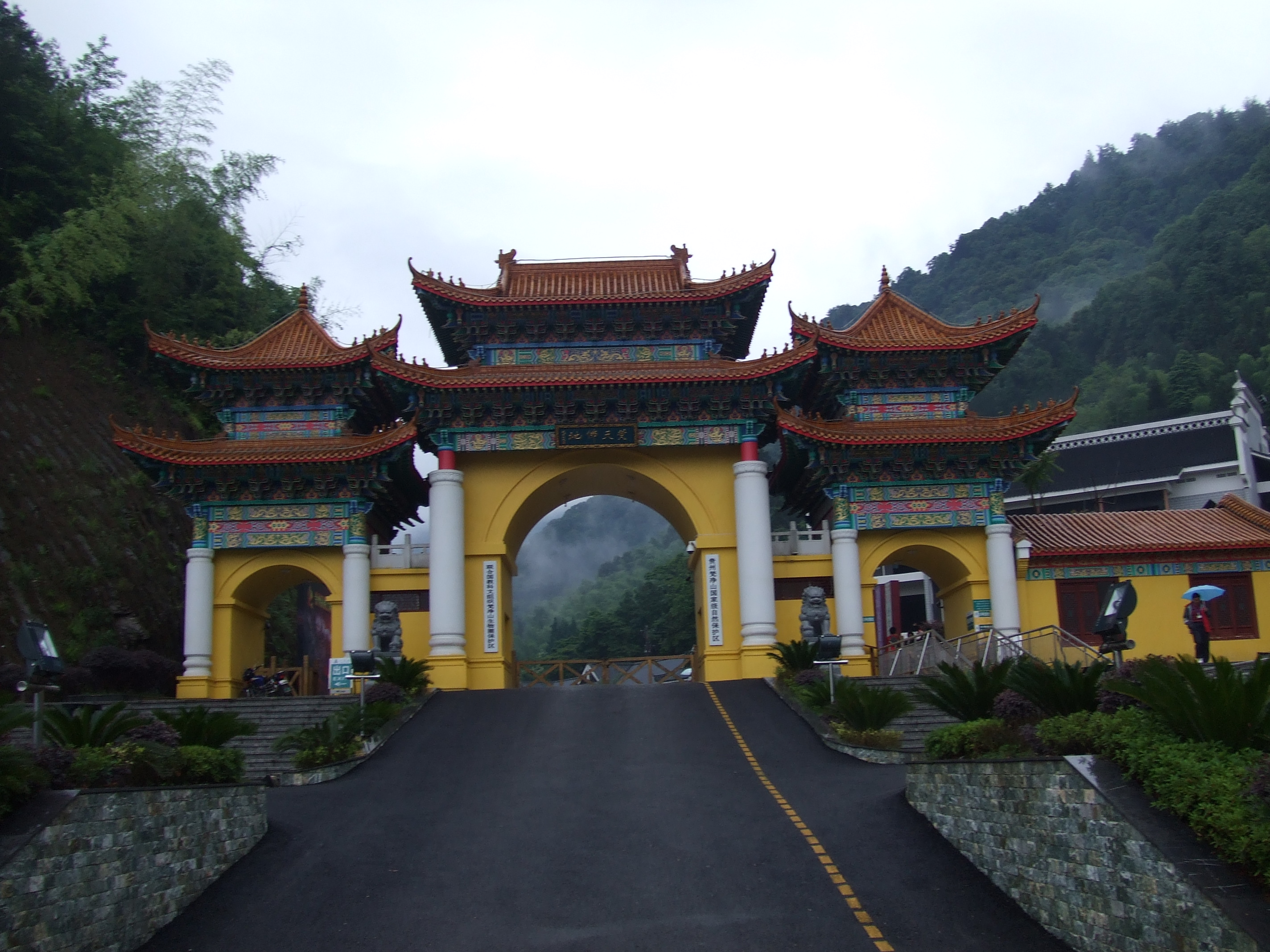 贵州-梵净山-风景区大门